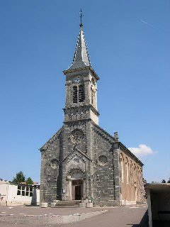 Église de Joncherey (Territoire de Belfort) Photo prise par LP90 en mai 2004. Licence GFDL LP90 mai 2004